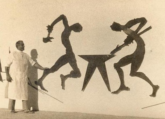 Vincenzo Bianchini in Algeria 1965 medico, pittore, filosofo (1903-2000) Bianchini's picture family - da famiglia Bianchini